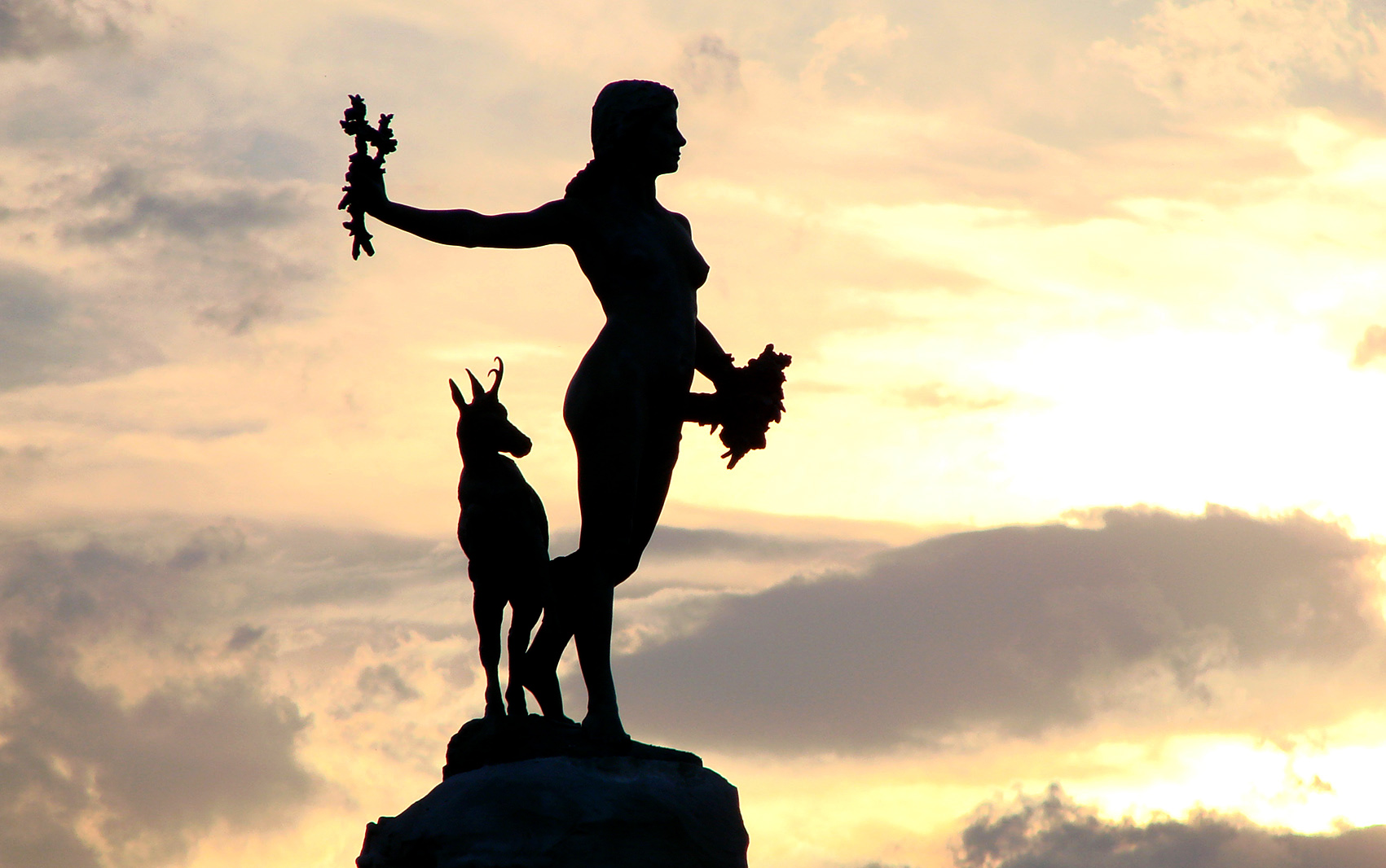 Le groupe couronnant la fontaine Duvignau (ou fontaine des quatre vallées), place Marcadieu à Tarbes, au crépuscule.